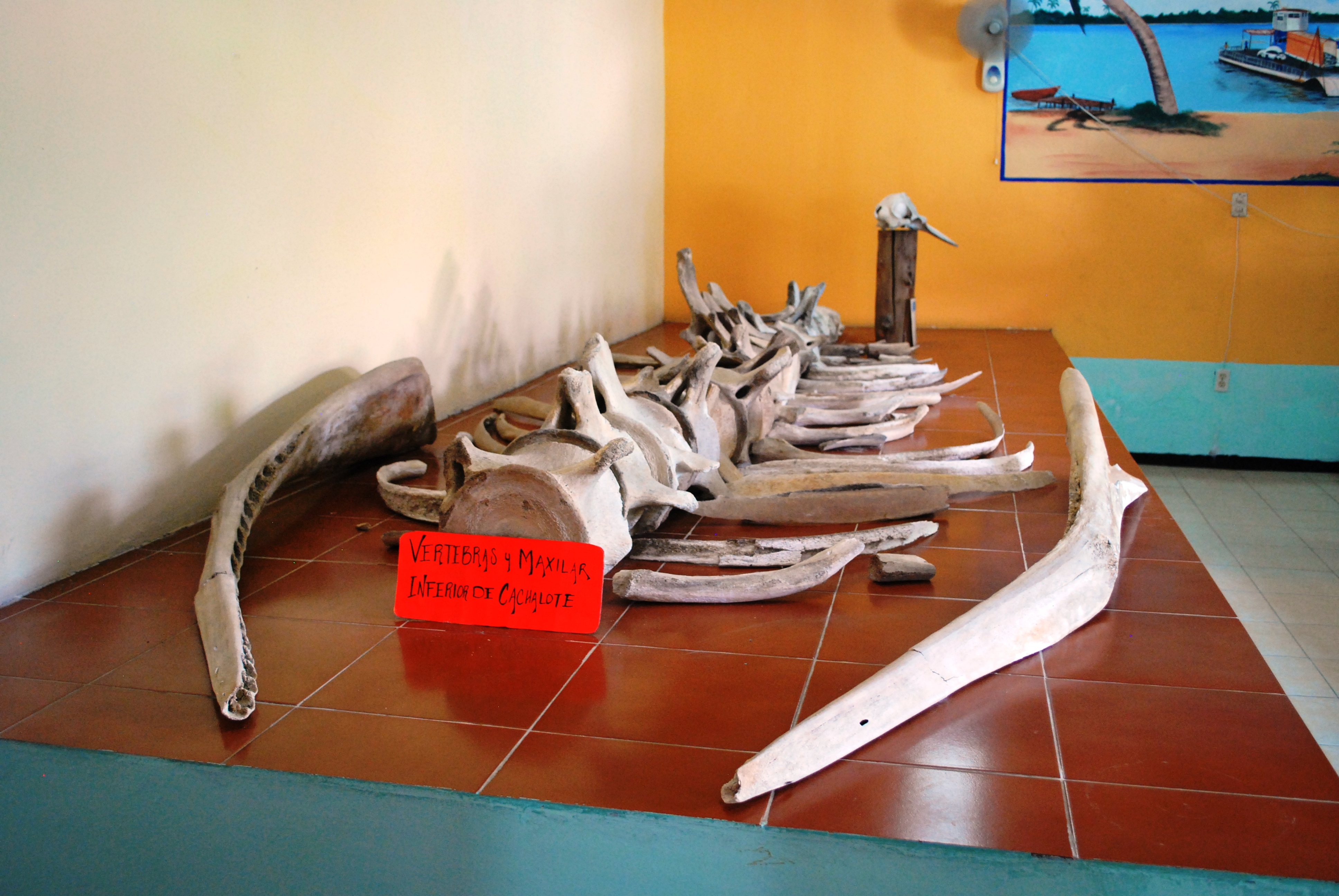 Ribs and backbone of the "monster" at the marine museum in Tecolutla, Veracruz